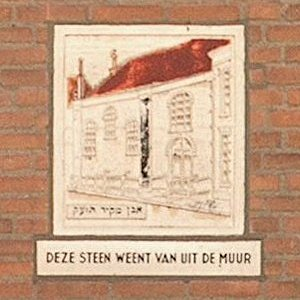 Hoorn, gedenksteen synagoge Italiaanse Zeedijk 122 (IM012984)